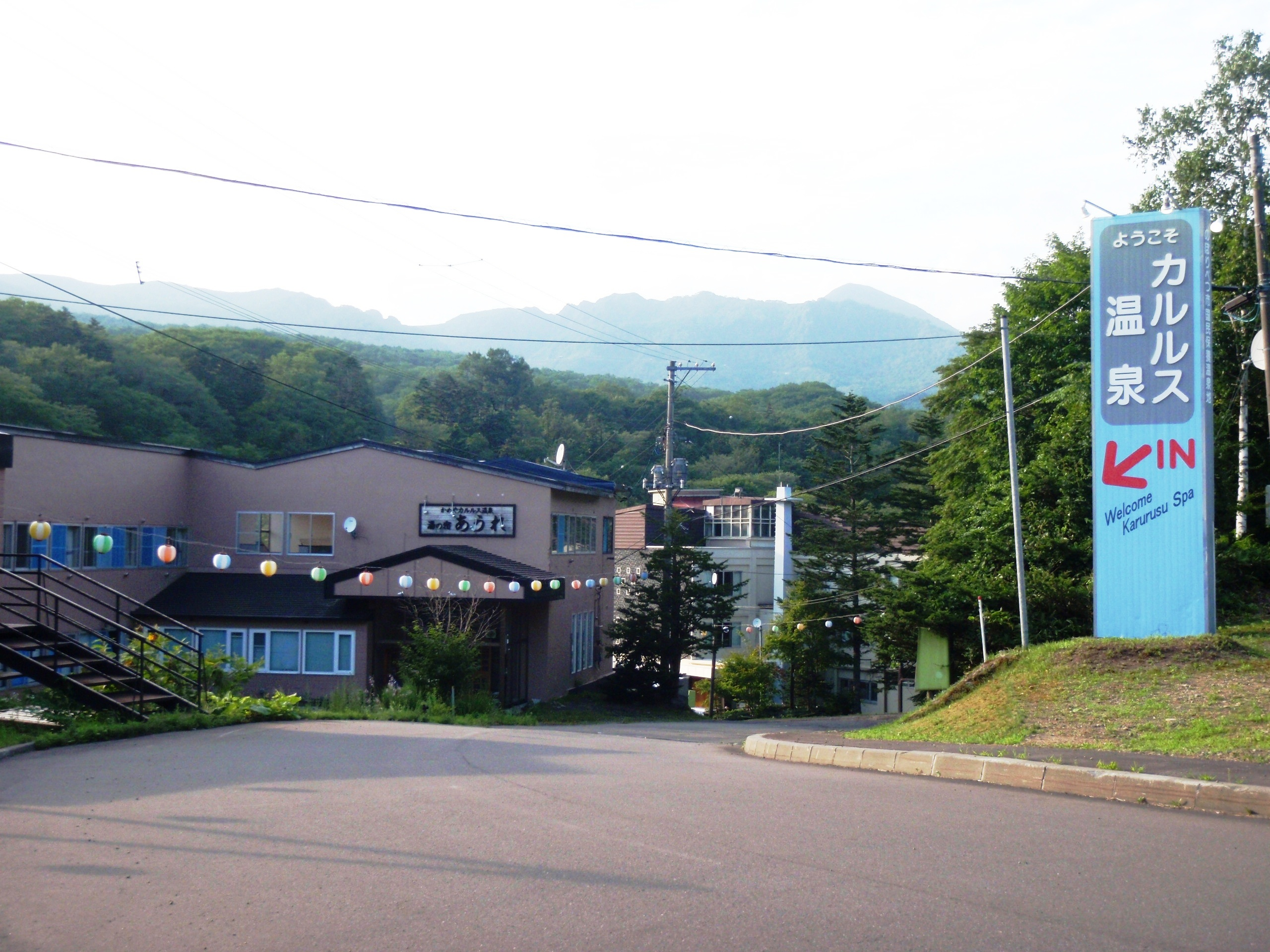 カルルス温泉街入口